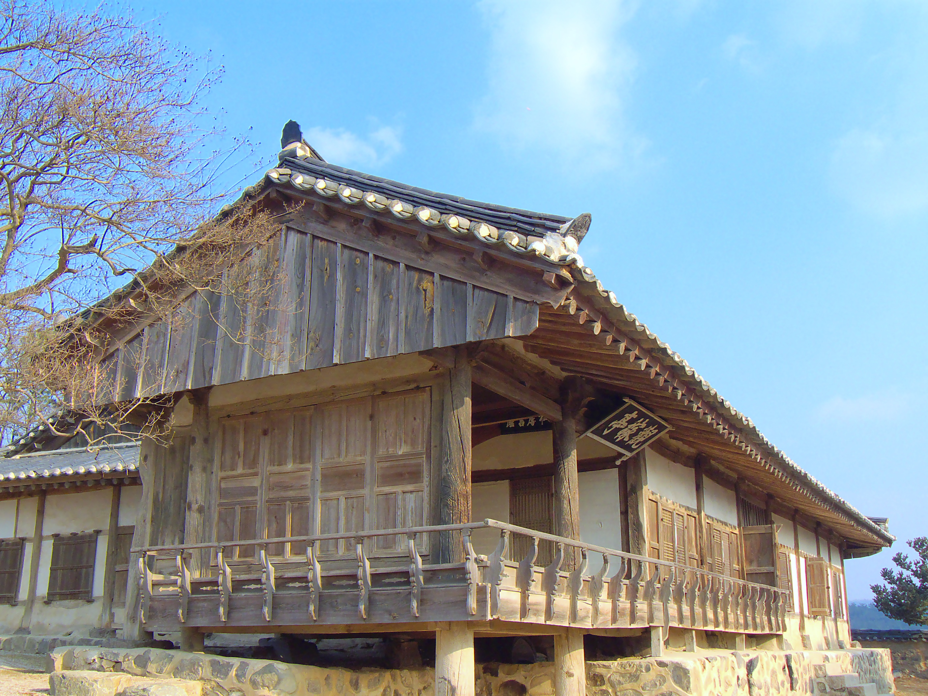 Yangdong Village, Gyeongju, Korea